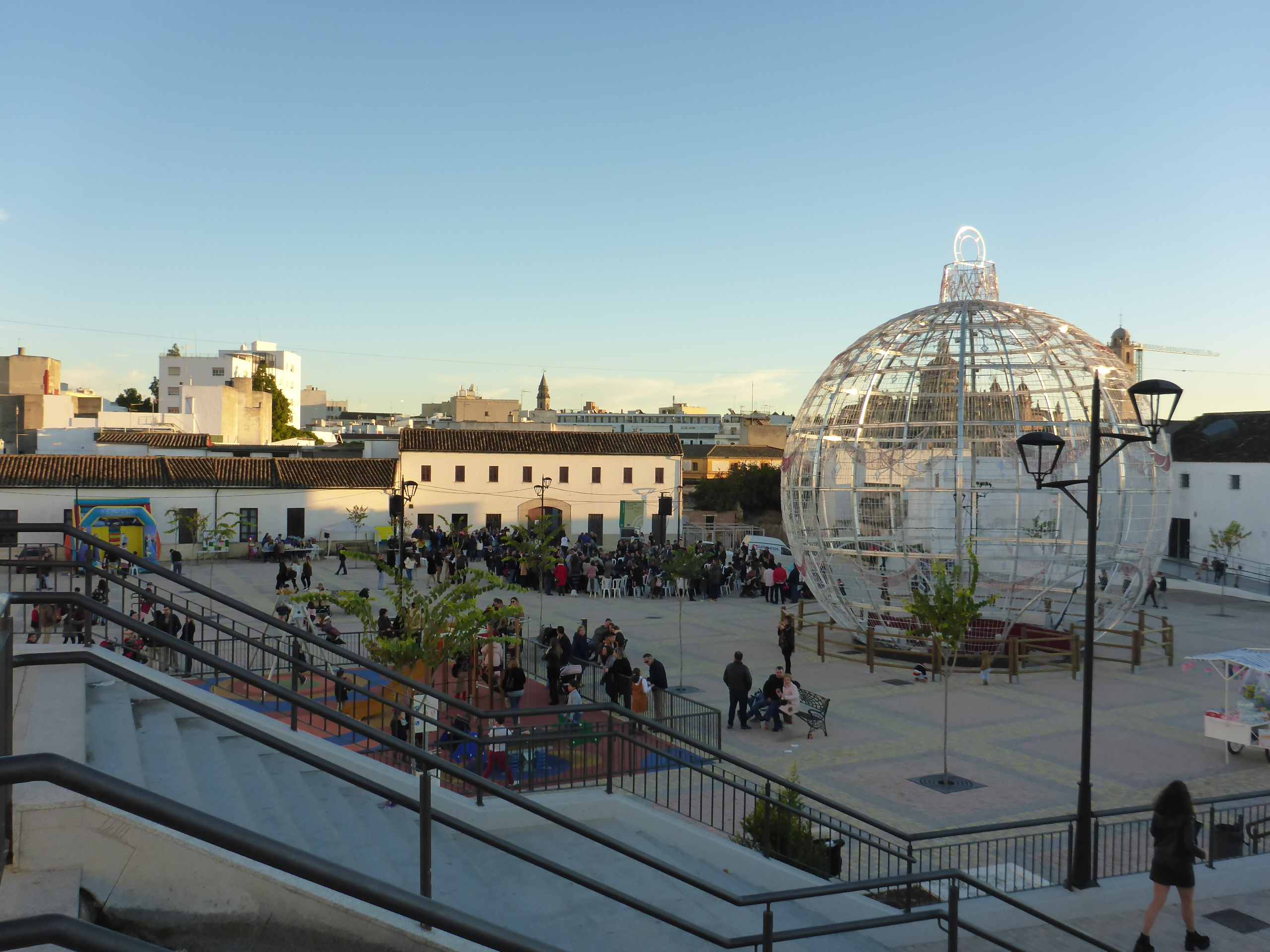 Zambomba en la Plaza de Belén, Jerez de la Frontera (España)